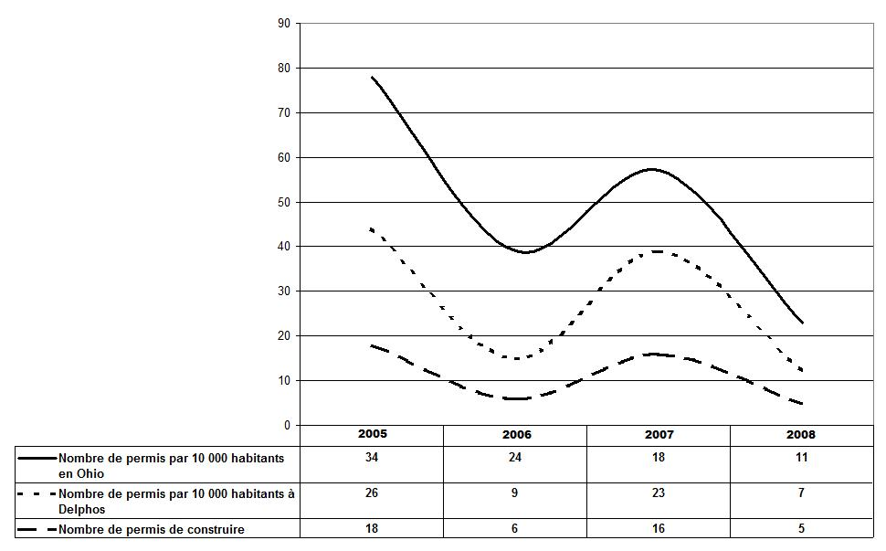 Nombre de permis de construire délivrés et valeur moyenne de la construction à Delphos (Ohio), entre 2005 et 2008.